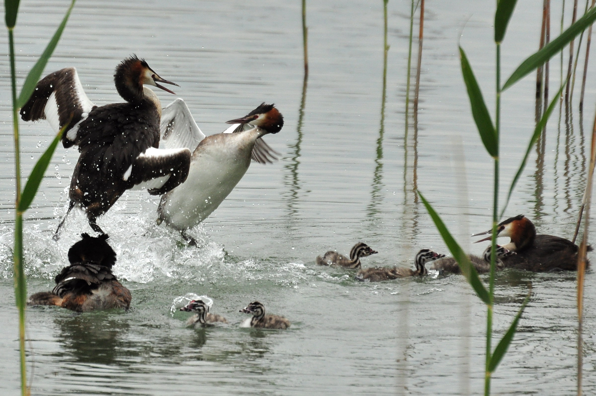 Podiceps cristatus on Obersee (upper Lake Zürich) respectively Seedamm and the wooden bridge (Holzbrücke) between Hurden and Rapperswil in Switzerland